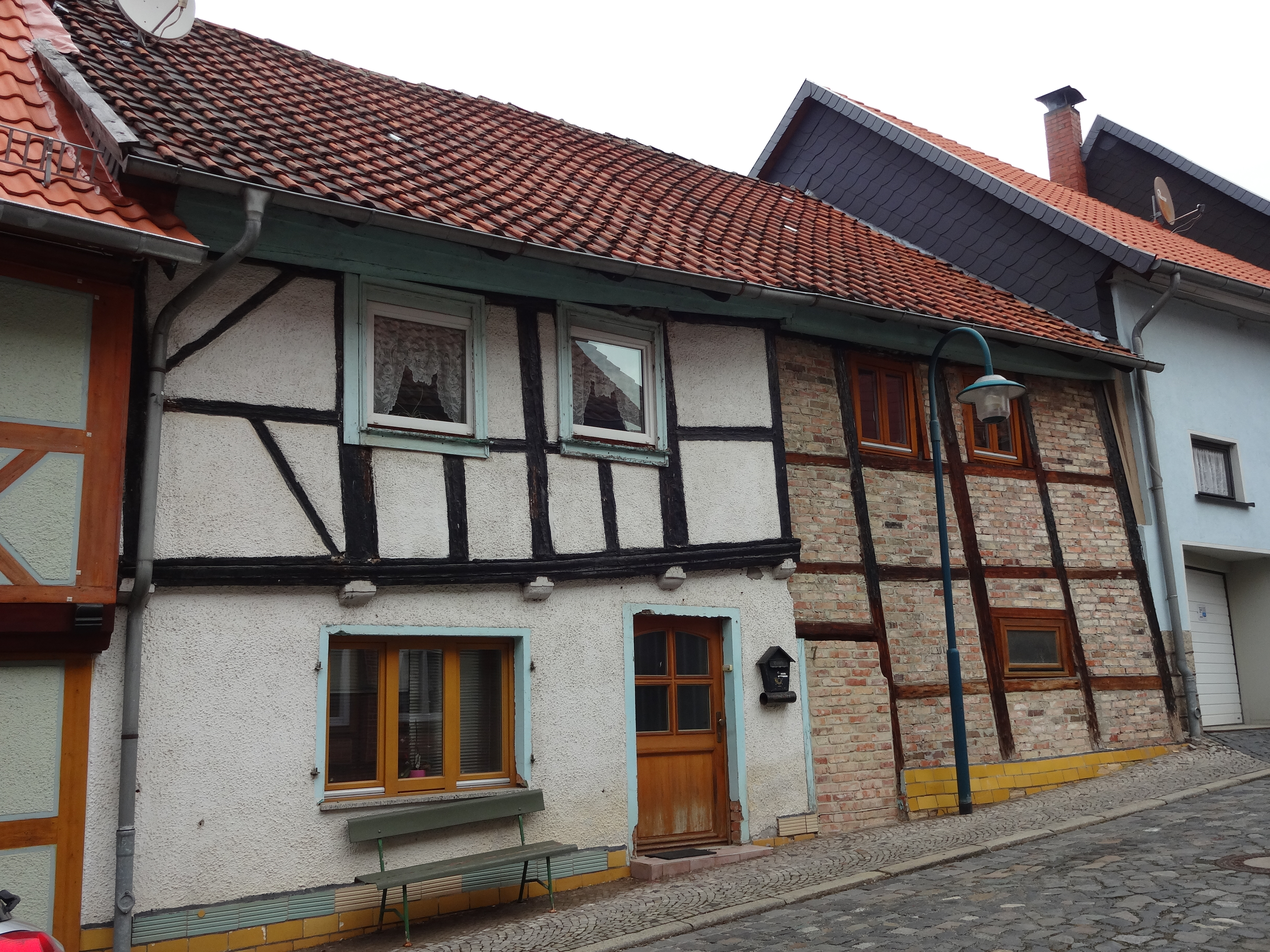 denkmalgeschütztes Fachwerkhaus in der Burgstraße 7 in Derenburg, Ortsteil von Blankenburg (Harz)